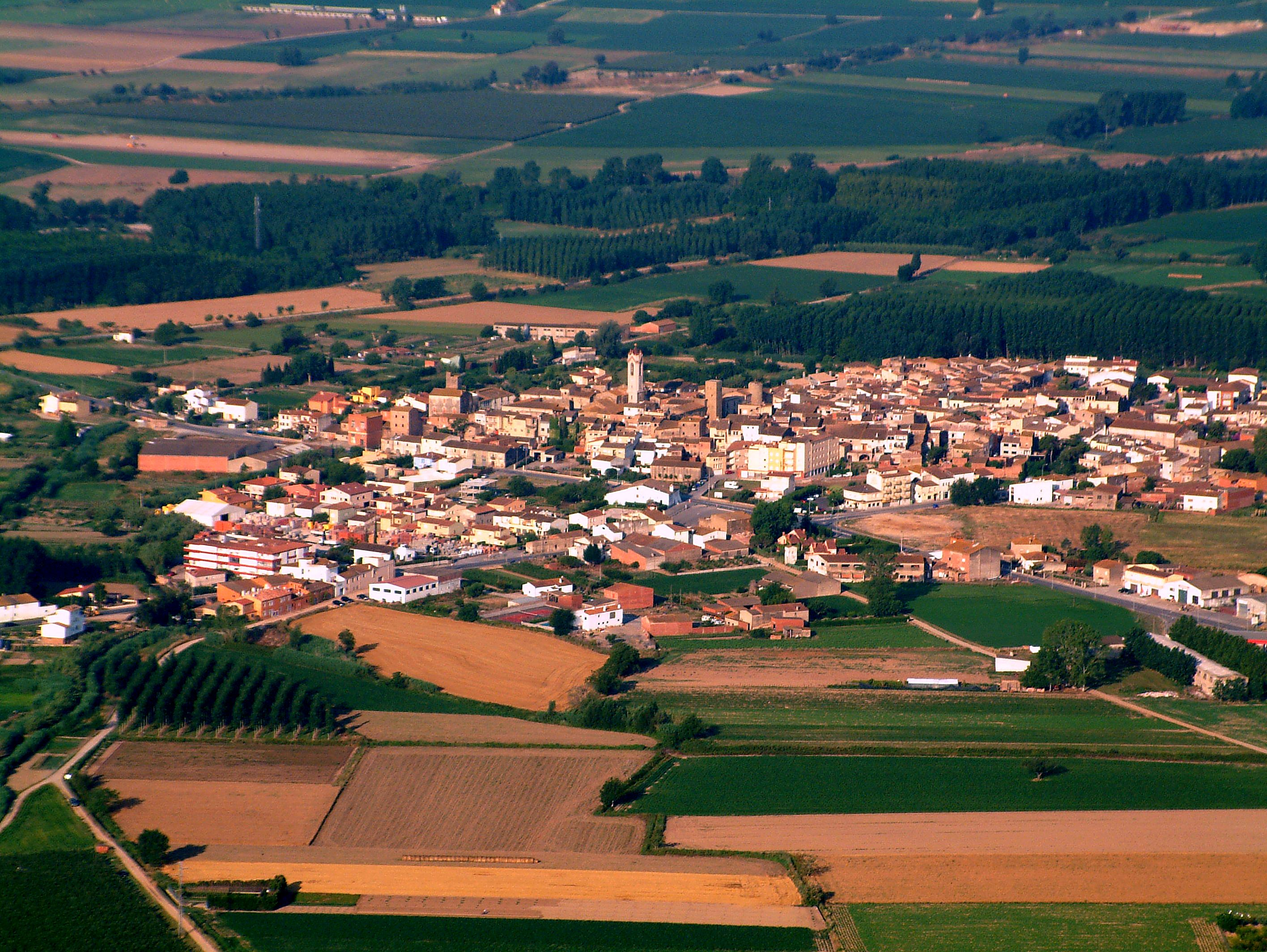 Verges des de l'aire